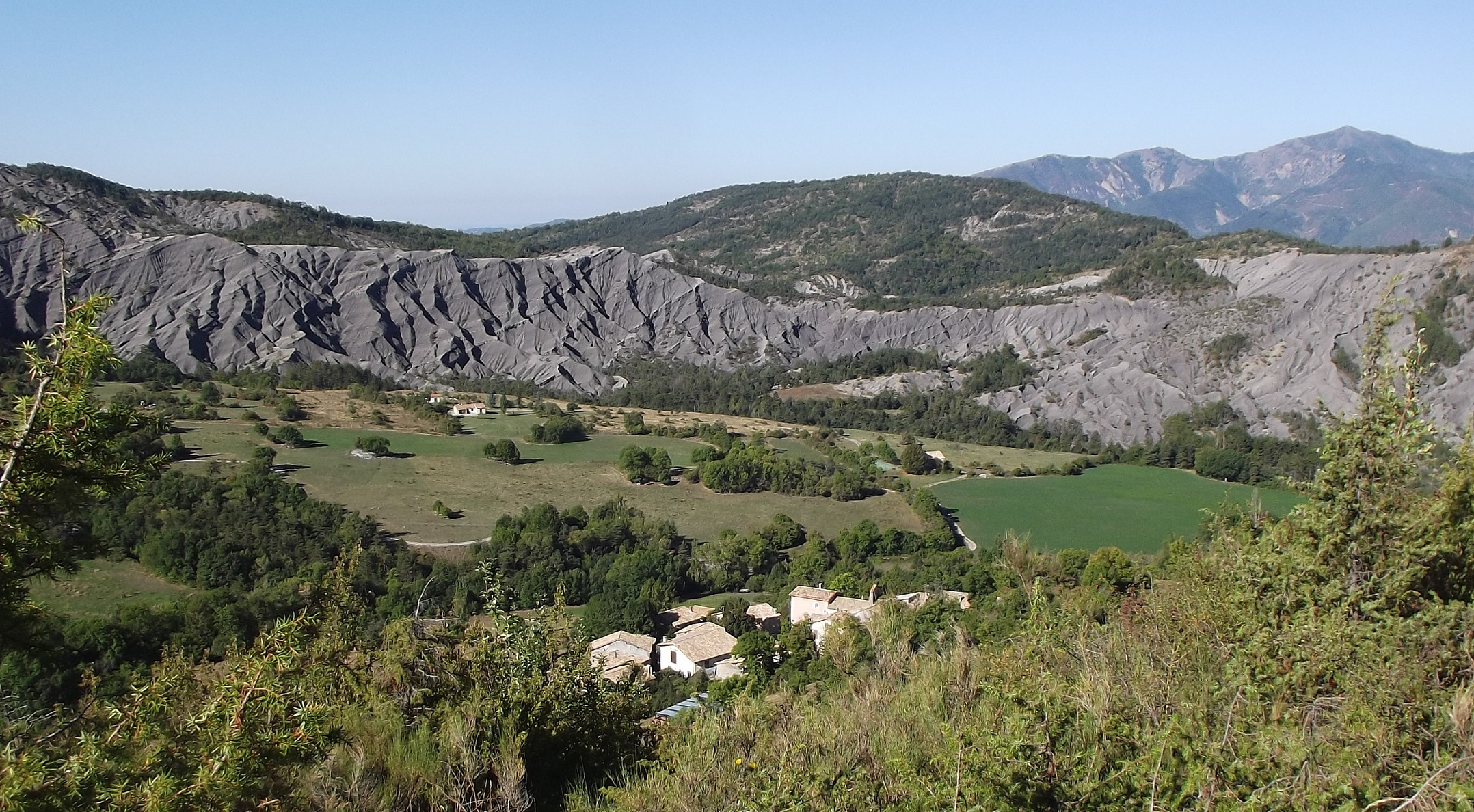 Le village d'Archail, un versant de badlands (terres noires)